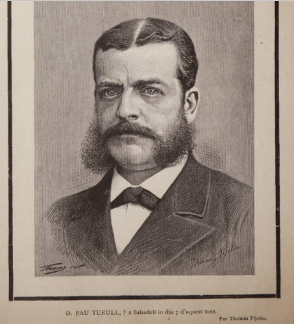 La Ilustració Catalana, número 293 30 Setembre de 1892 pàg. 273